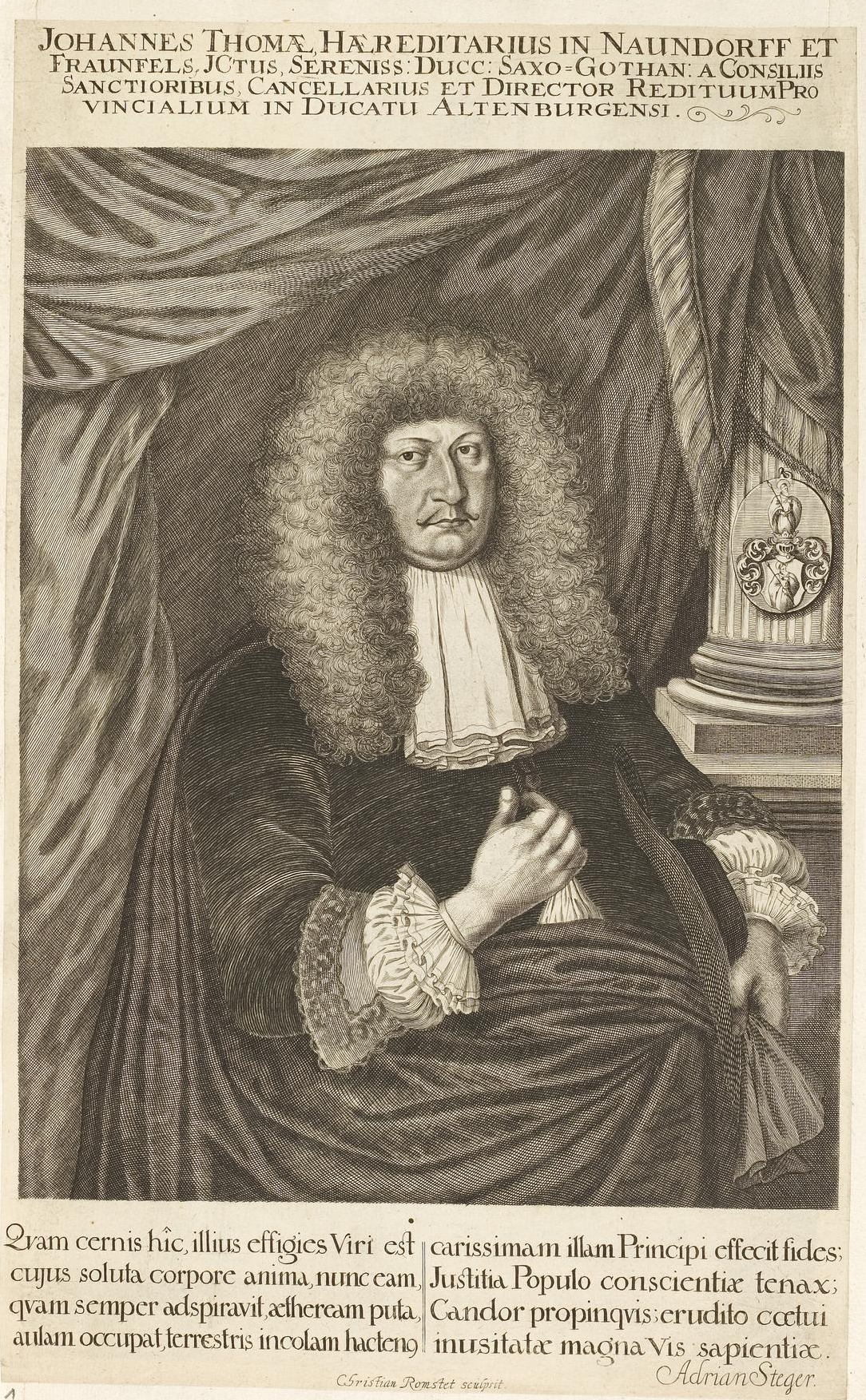 Grafik aus dem Klebeband Nr. 1 der Fürstlich Waldeckschen Hofbibliothek Arolsen Motiv: Johannes Thomae (1624–1679), 1650 Prof. in Jena und Assessor des Hofgerichts und Schöppenstuhls; ab 1652 Hof- und Justizrat und Gesandter für Sachsen-Altenburg am Reichstag in Regensburg; 1668 Kanzler des Herzogs Friedrich Wilhelm II. von Sachsen-Altenburg GND: 119190311